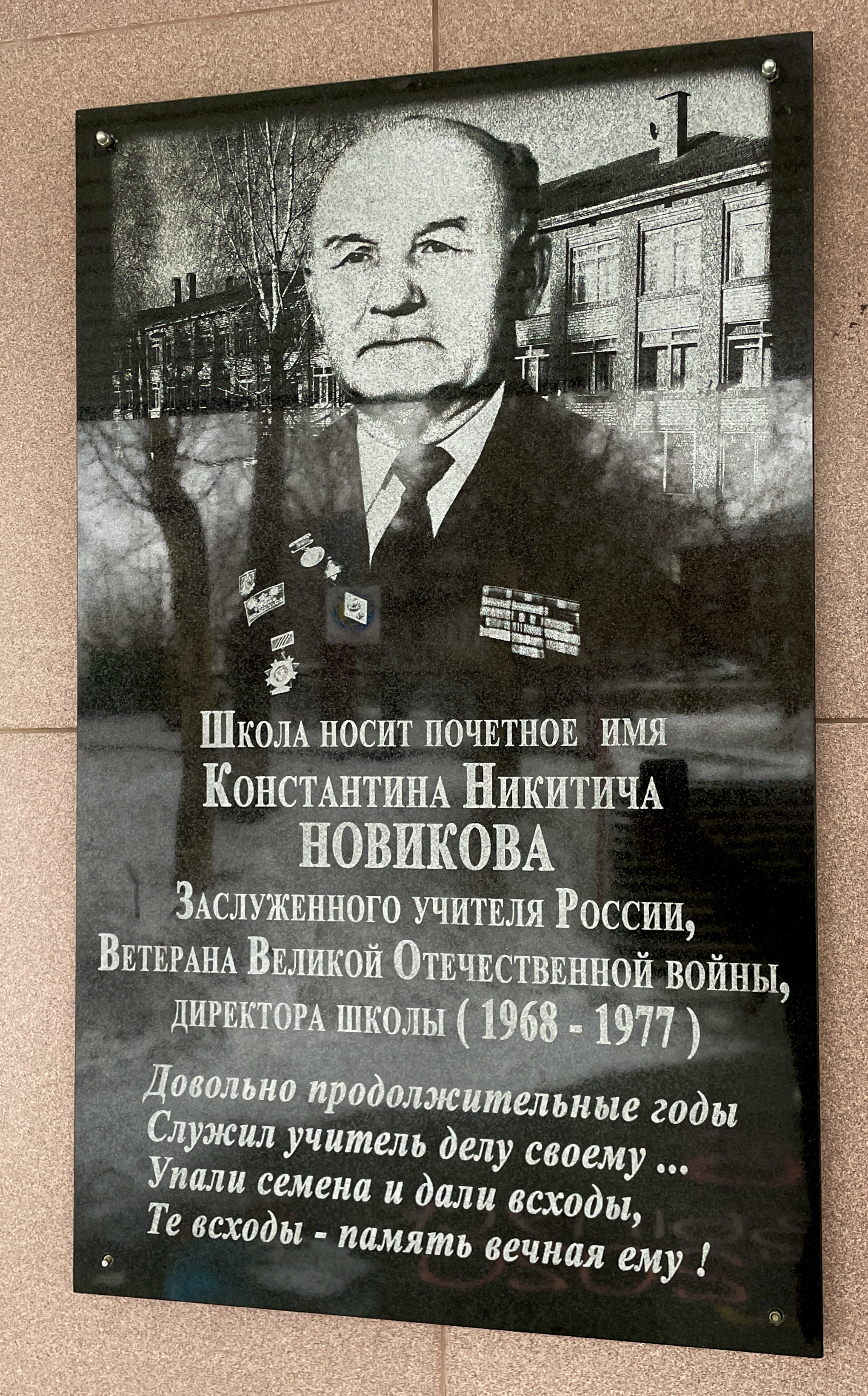 Памятная табличка на входе в школу им. Новикова в Качканаре